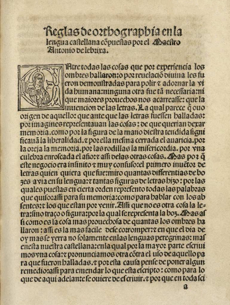 Primera página del libro de Antonio de Nebrija titulado "Reglas de orthographia en la lengua castellana". Impreso en Alcalá de Henares, el 12 de mayo de 1517, por Arnao Guillén de Brocar.